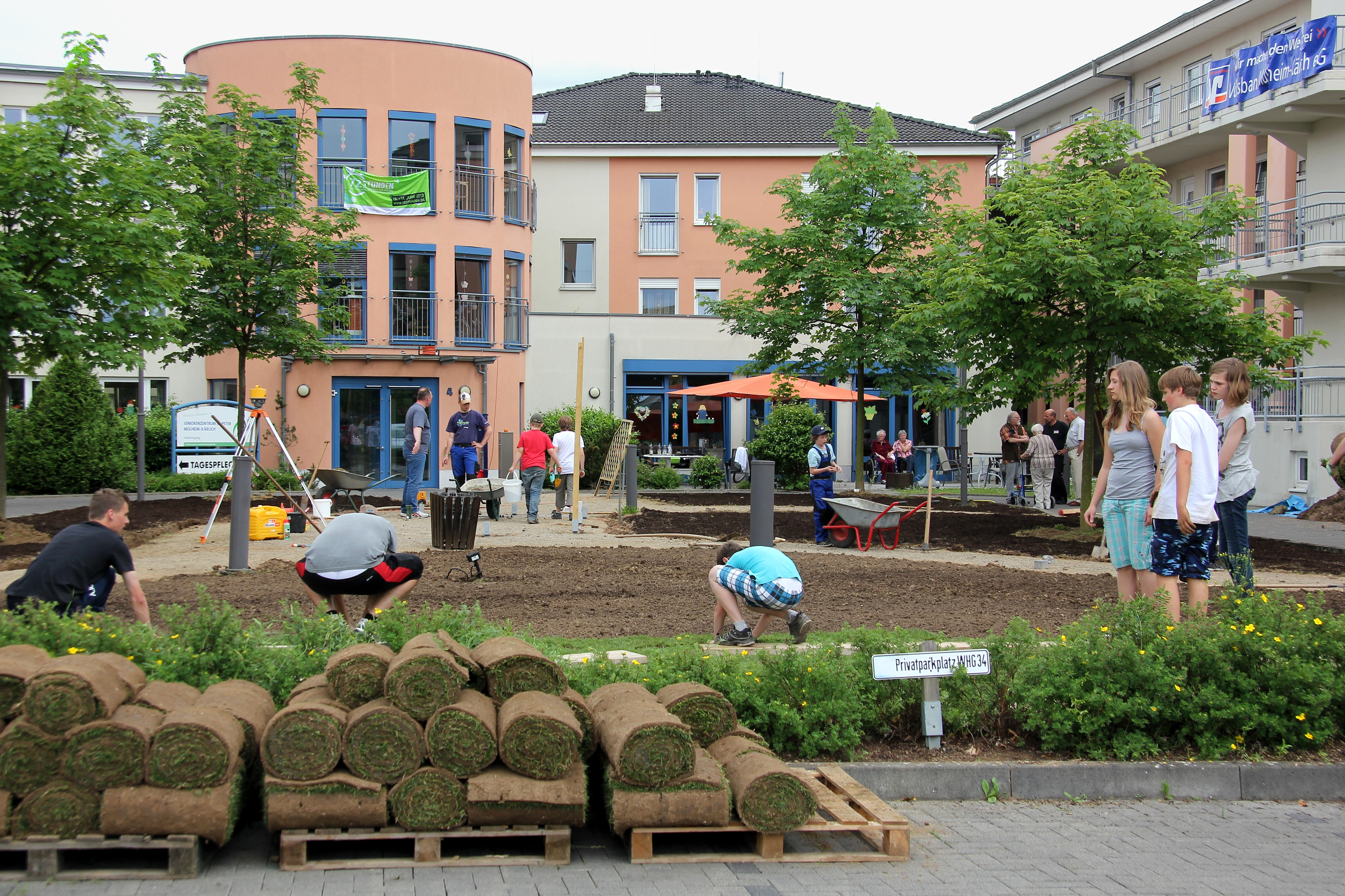 „72 Stunden – Uns schickt der Himmel“, Kolpingjugend und Messdiener in der Aktion des BDKJ am Seniorenzentrum St. Peter in Mülheim-Kärlich. Neuer Rasen wird verlegt.